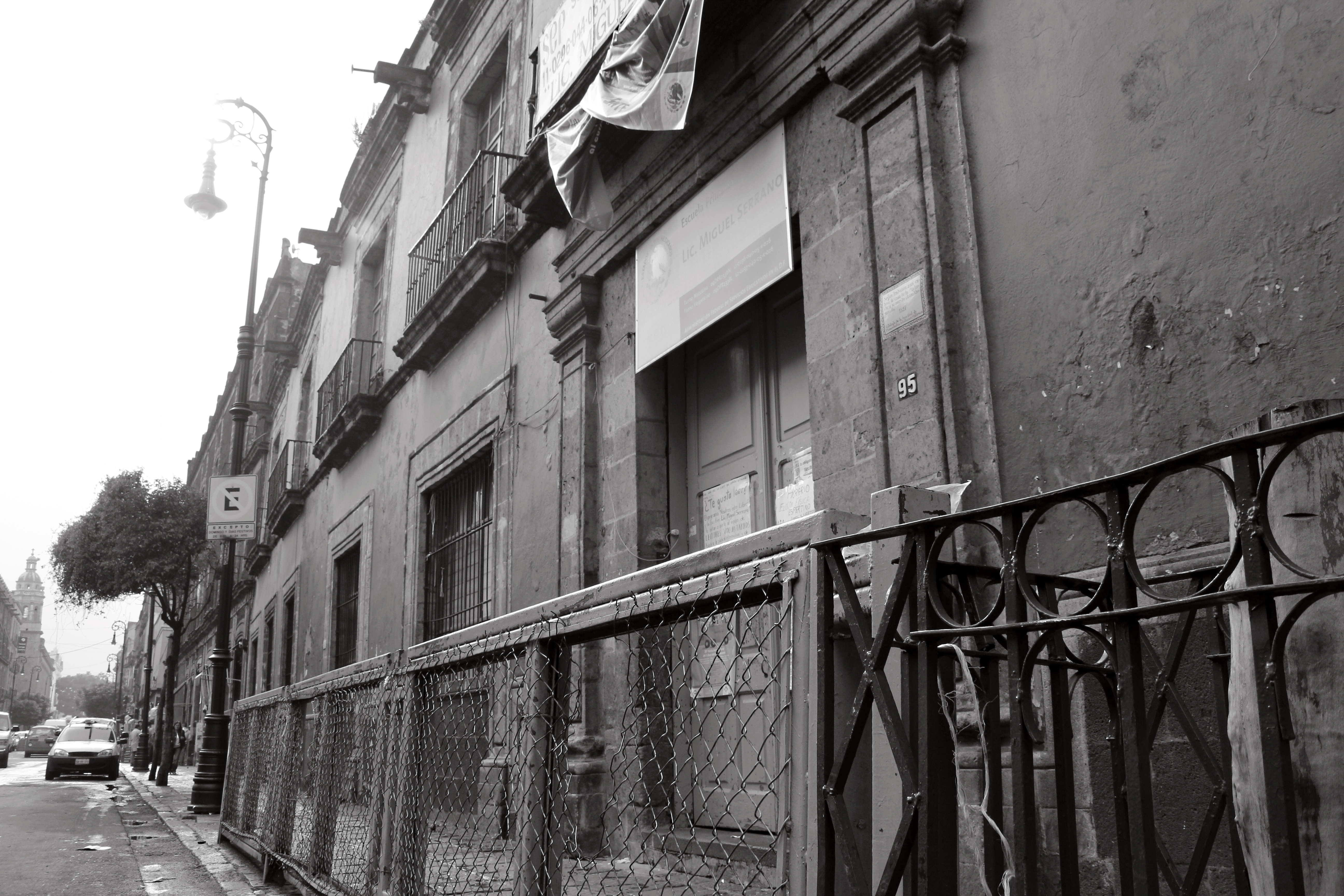 Casa de la Malinche, ubicada en calle República de Cuba N. 95, Centro Histórico de la Ciudad de México.